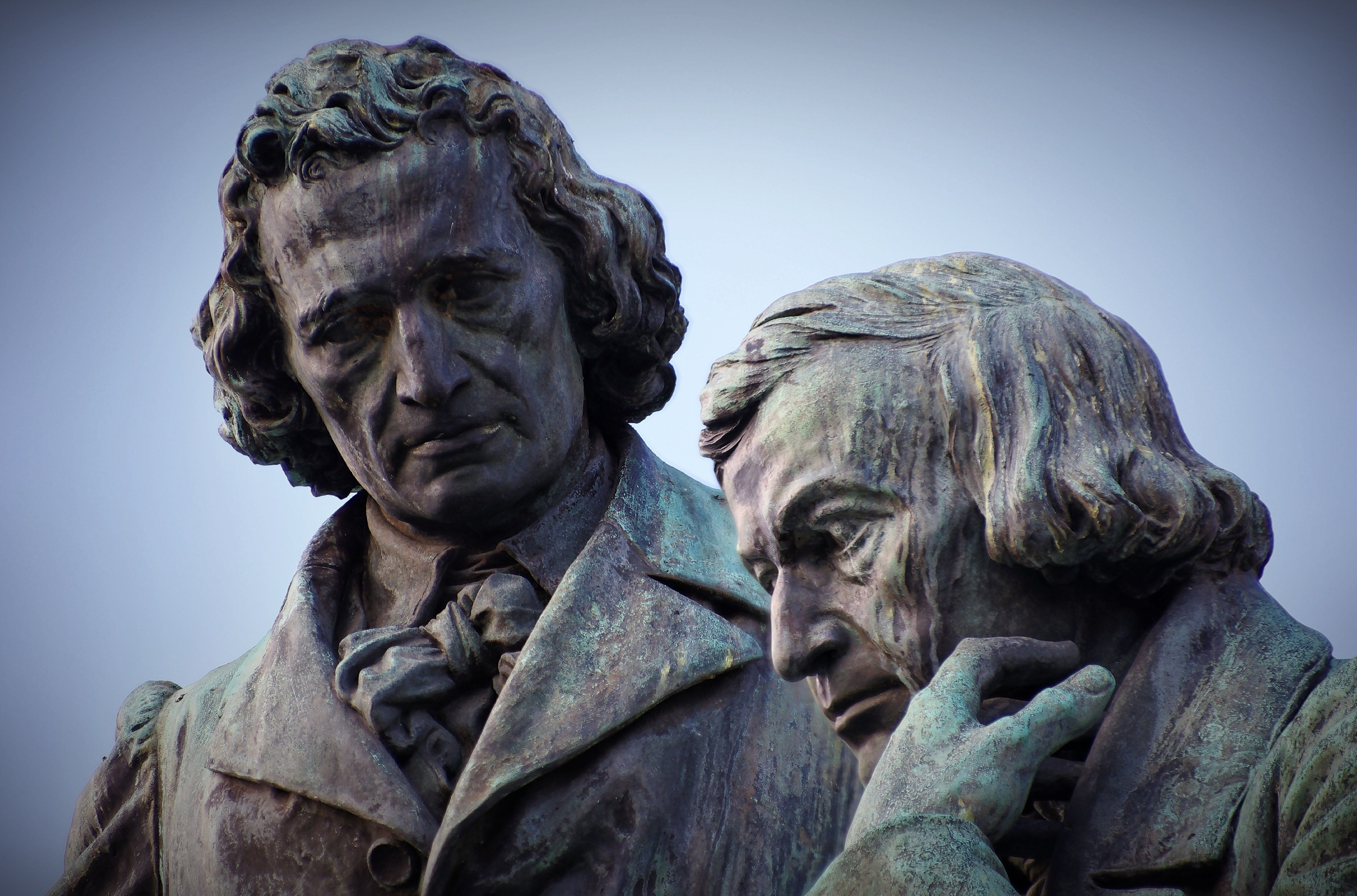 Brüder Grimm Denkmal auf dem Hanauer Marktplatz